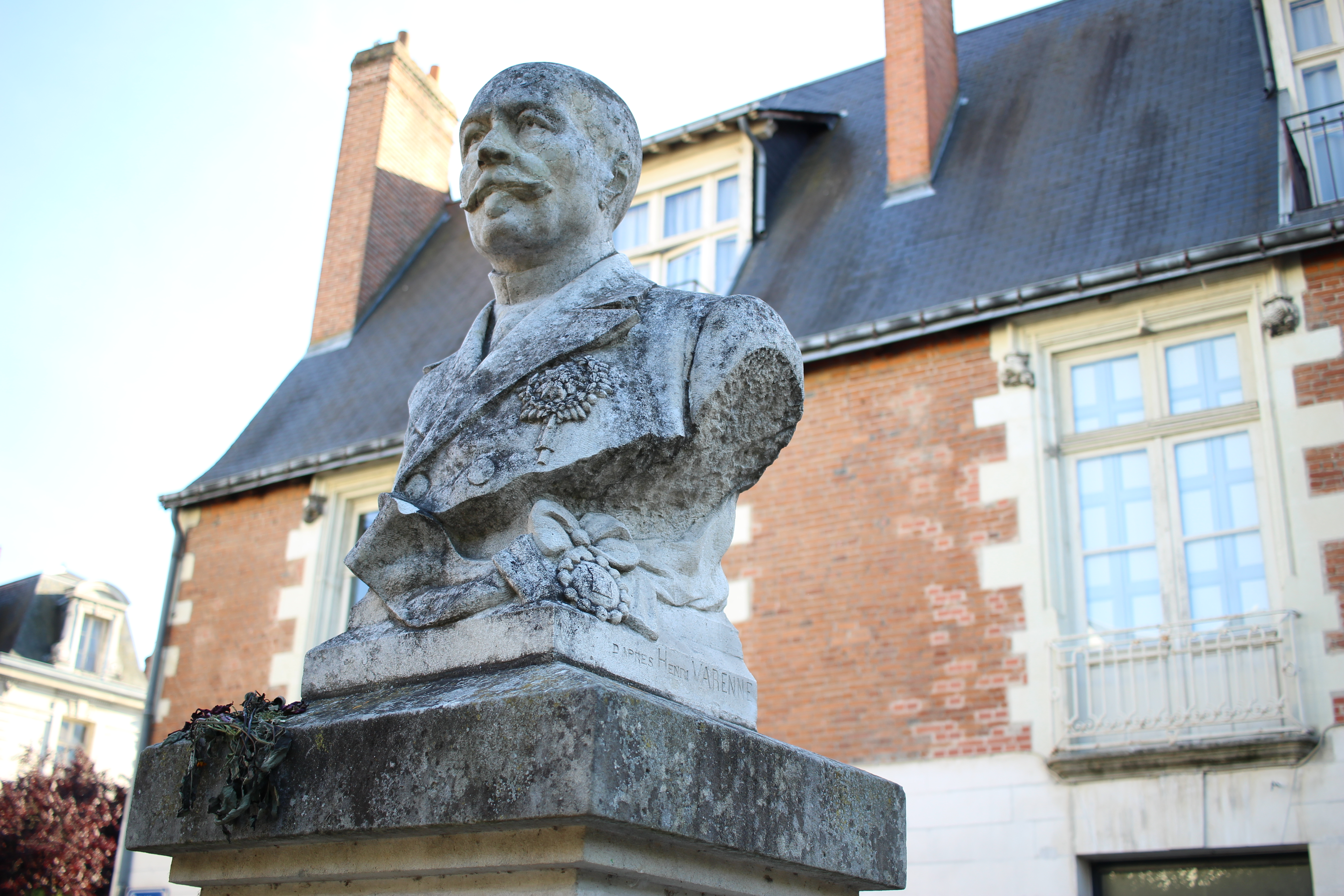 Sculpure d'Antoine-Dieudonné Belle, Ancien maire de Tours par Henri Varenne